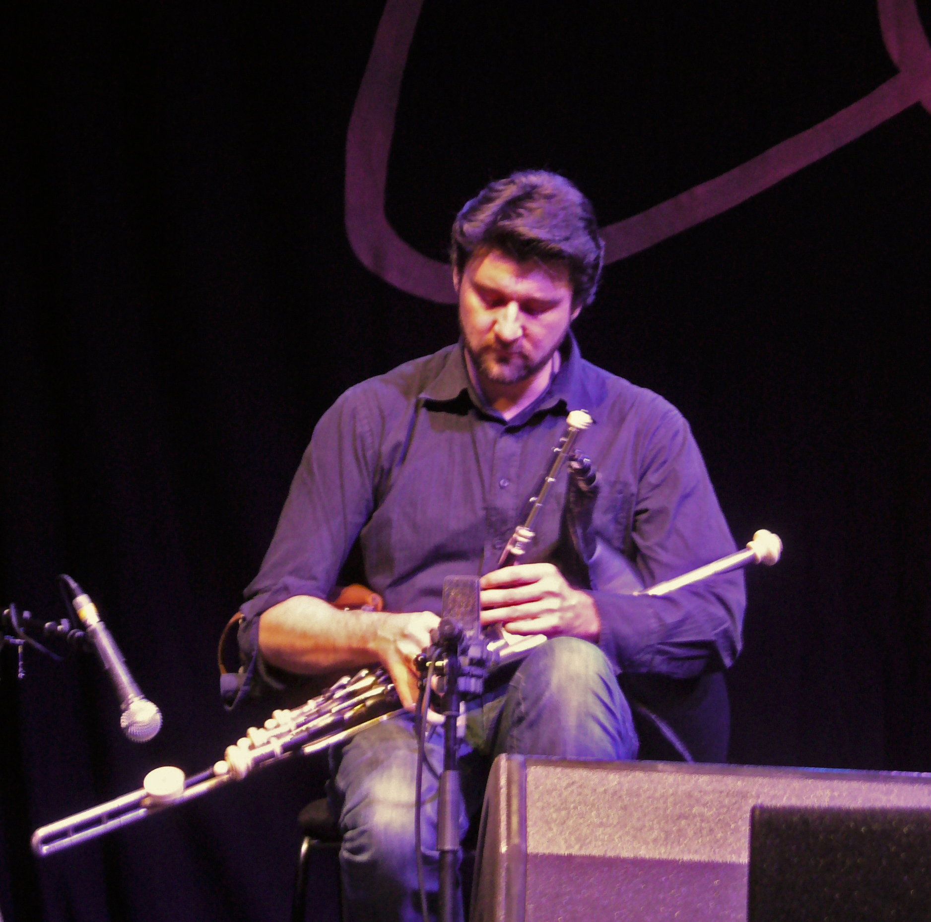 Le joueur de uilleann pipes Ronan Le Bars avec le groupe Pennoù Skoulm au Celtic Connections de Glasgow en 2010